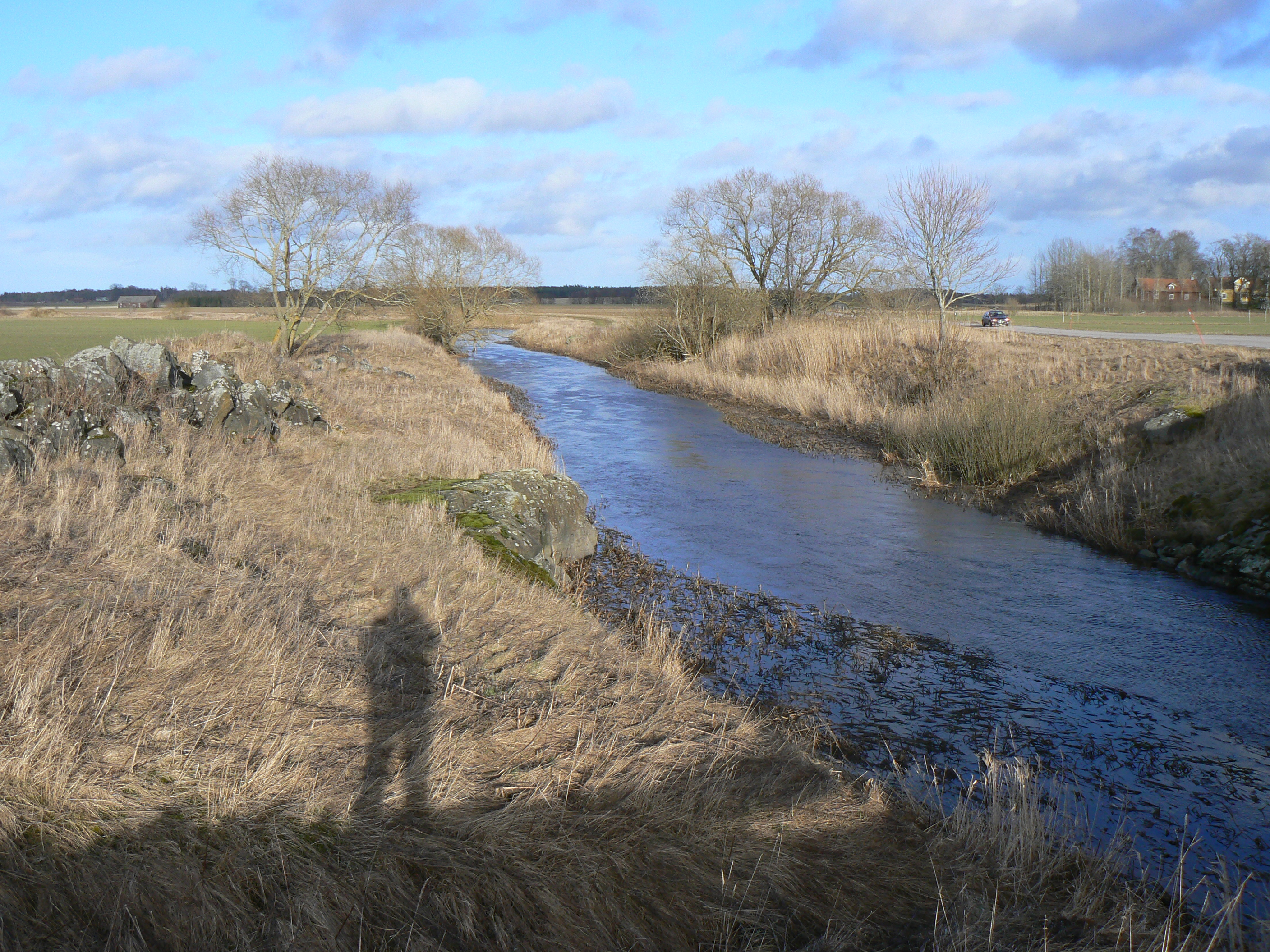 Lillån river in central Östergötland, Sweden. Photo by Skvattram 2007-03-18.